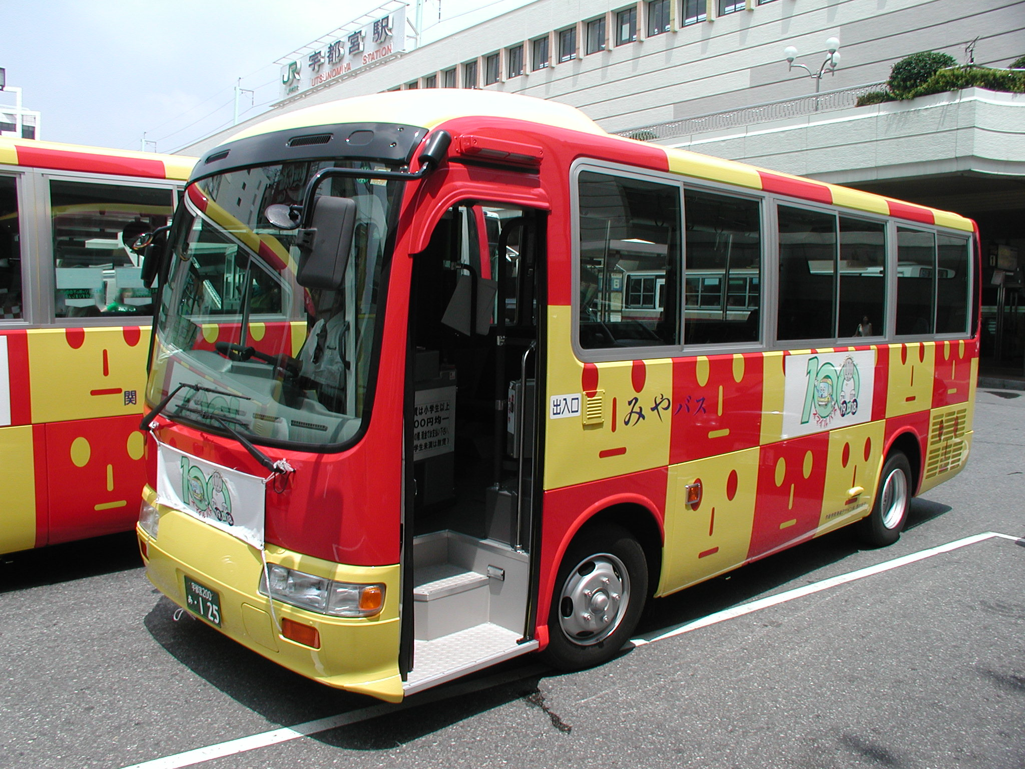 宇都宮商工会議所が宇都宮まちづくり推進機構24の提言をもとに、関東自動車に委託して2001年の夏から秋に試験運行された、宇都宮市の市内中心街循環バス「スマイルバス」。2002年に開業したきぶな号の前身。 登録番号：宇都宮200あ・125 撮影地：栃木県宇都宮市、JR宇都宮駅西口